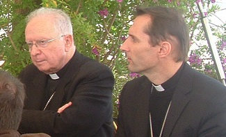 Messeigneurs Bernard Panafieu et Nicolas Brouwet lors d'une conférence de presse.